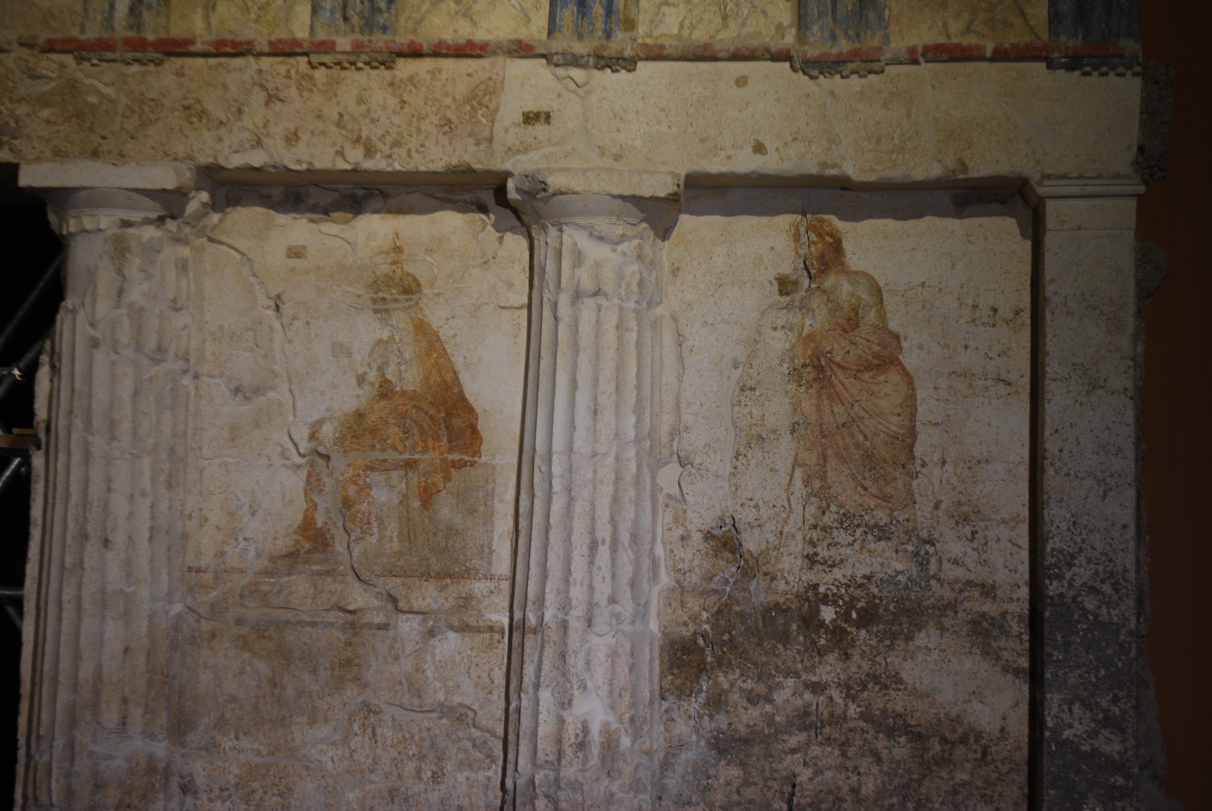 Vue des tombes macédoniennes de Mieza (Naousa).